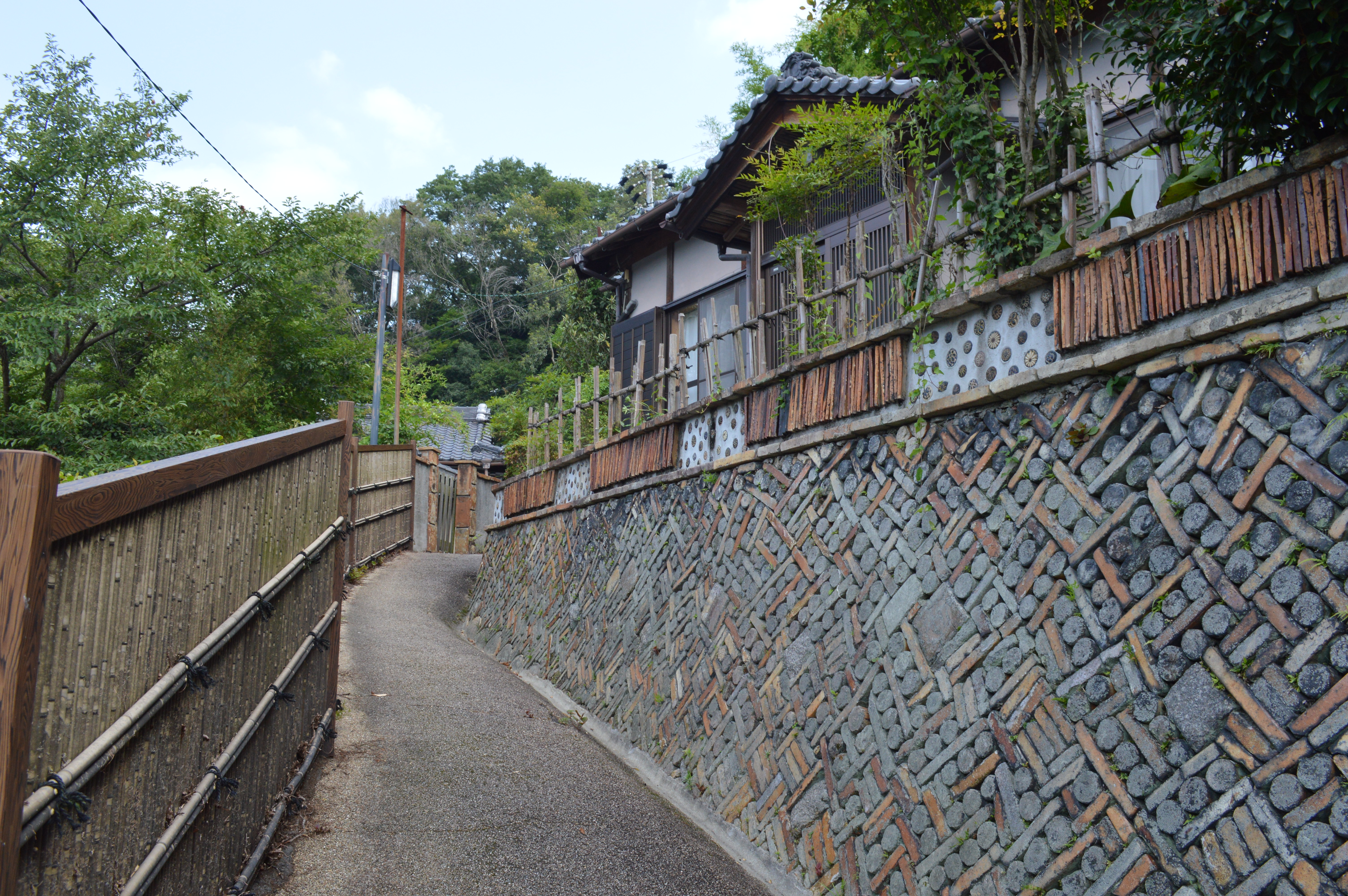 愛知県瀬戸市の散策路「窯垣の小径」。